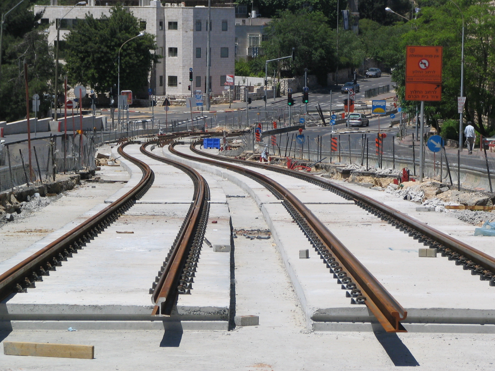 עבודות הנחת פסי הרכבת בשדרות הרצל בירושלים